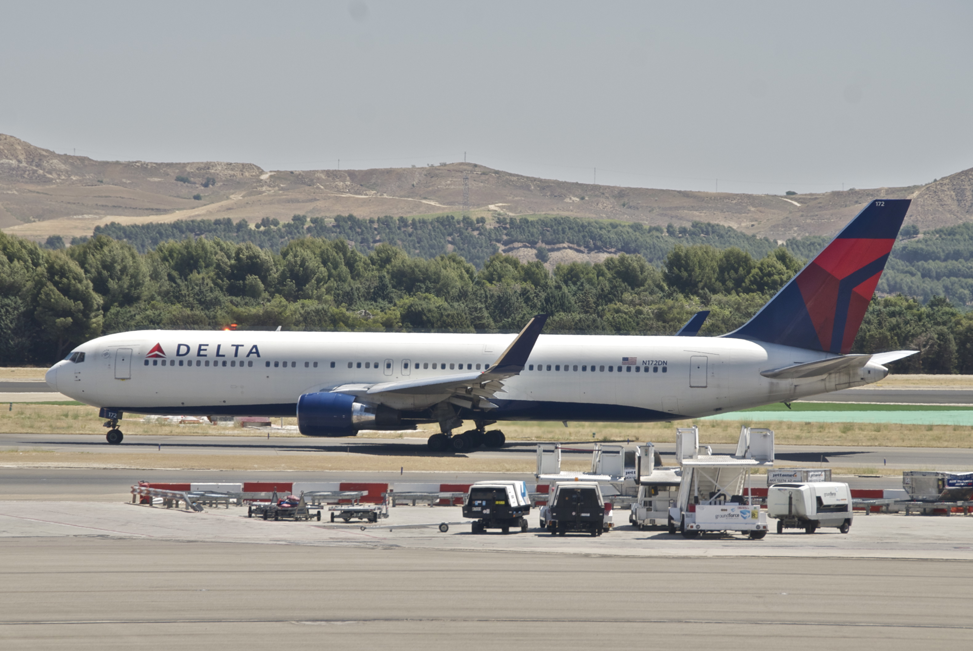 Delta Air Lines Boeing 767-300; N172DN@MAD;30.06.2012/658ci